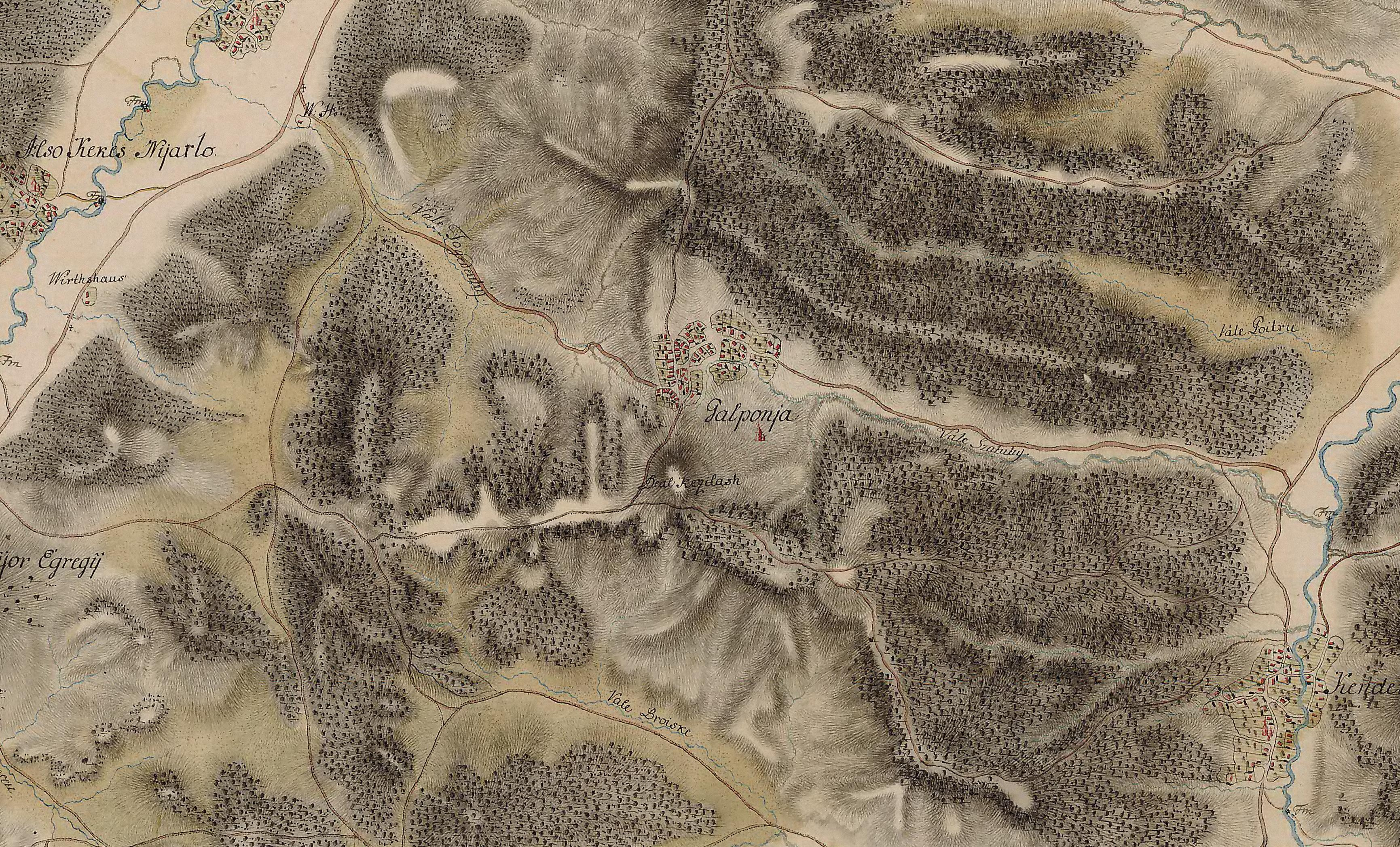 Gălpâia - Galponja pe harta Iosefina, sectiunea 28